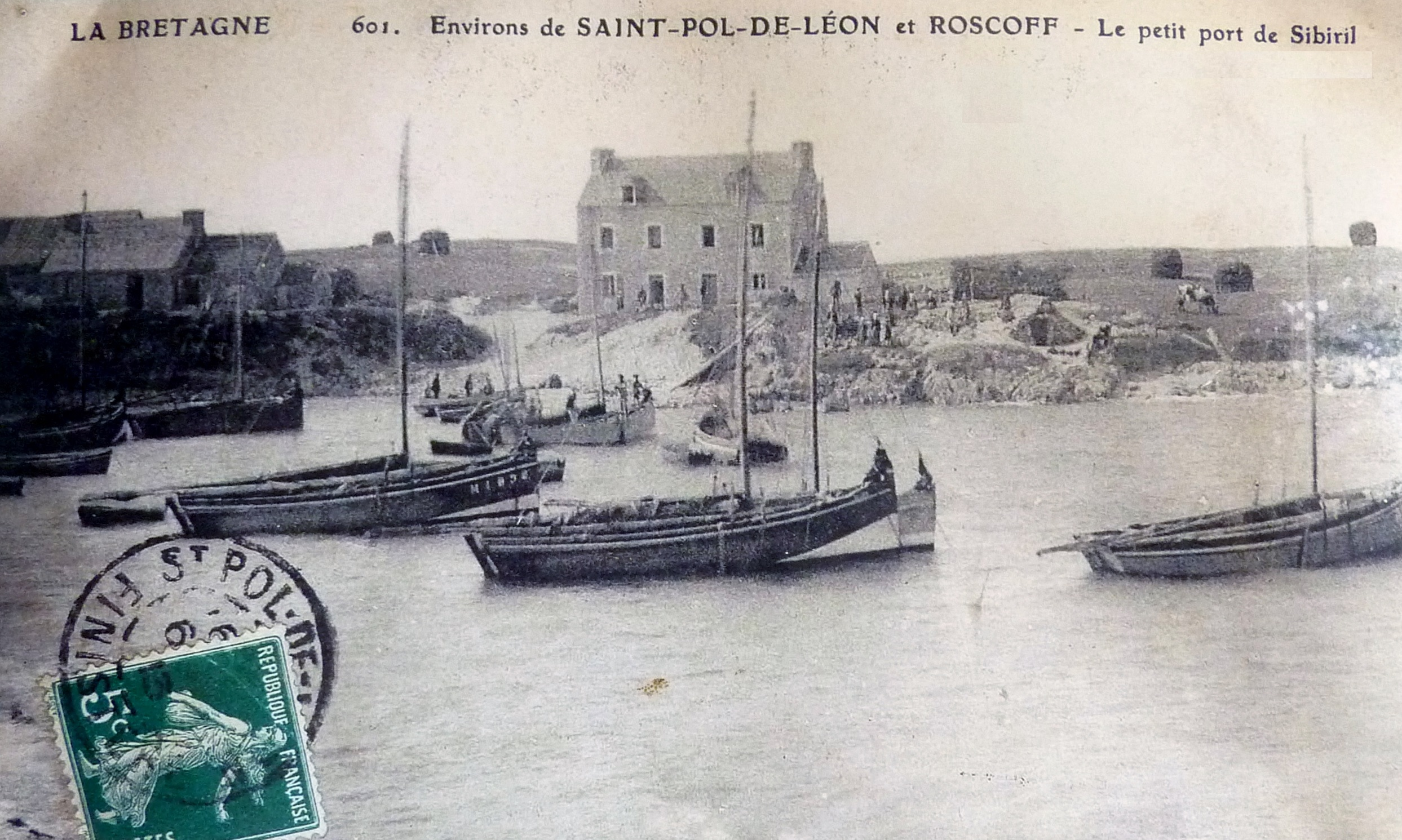 Le port de Moguériec vers 1900 (carte postale, auteur inconnu)